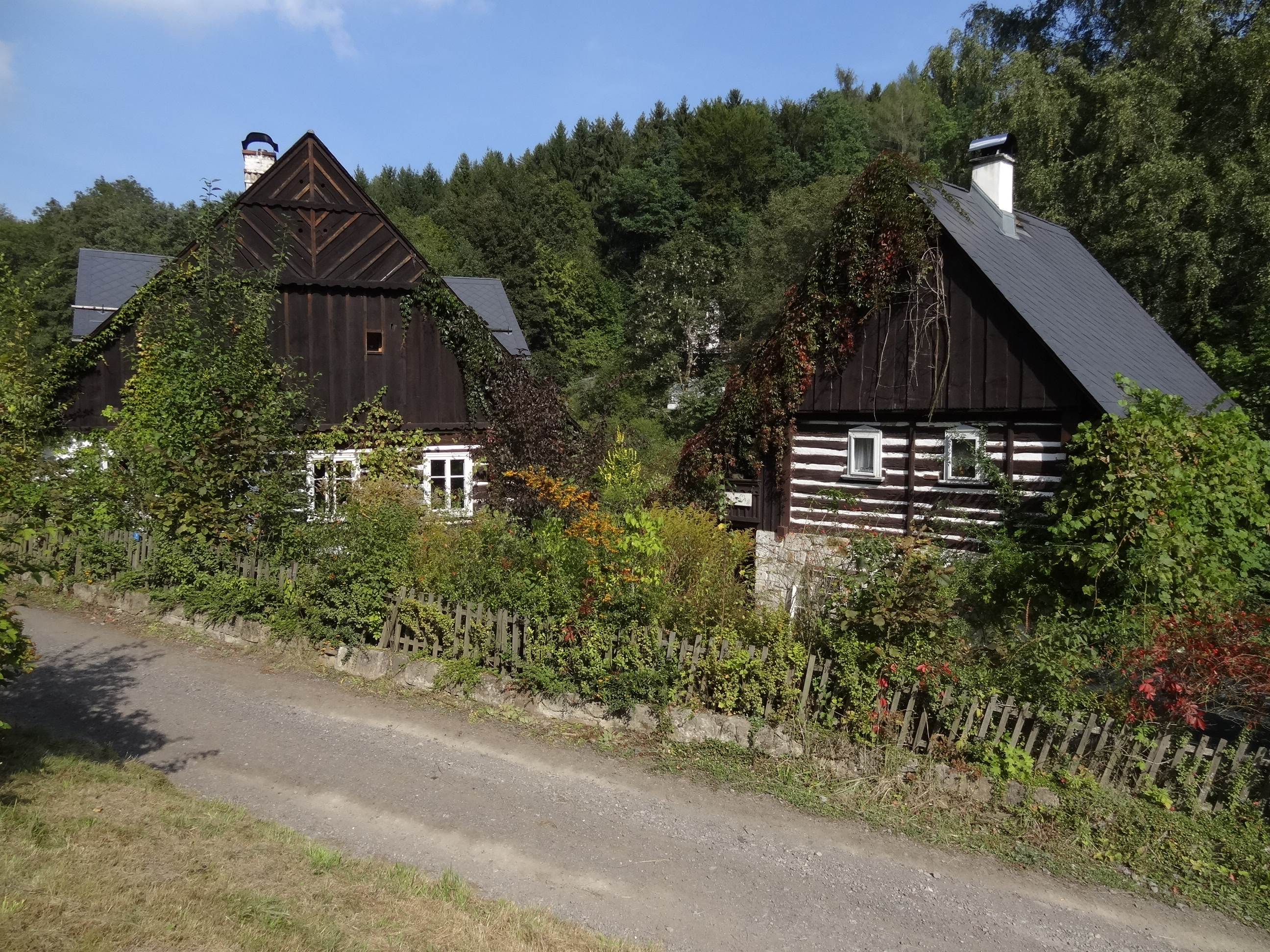 Vacardův mlýn, Labe 191, Labe (Malá Skála).